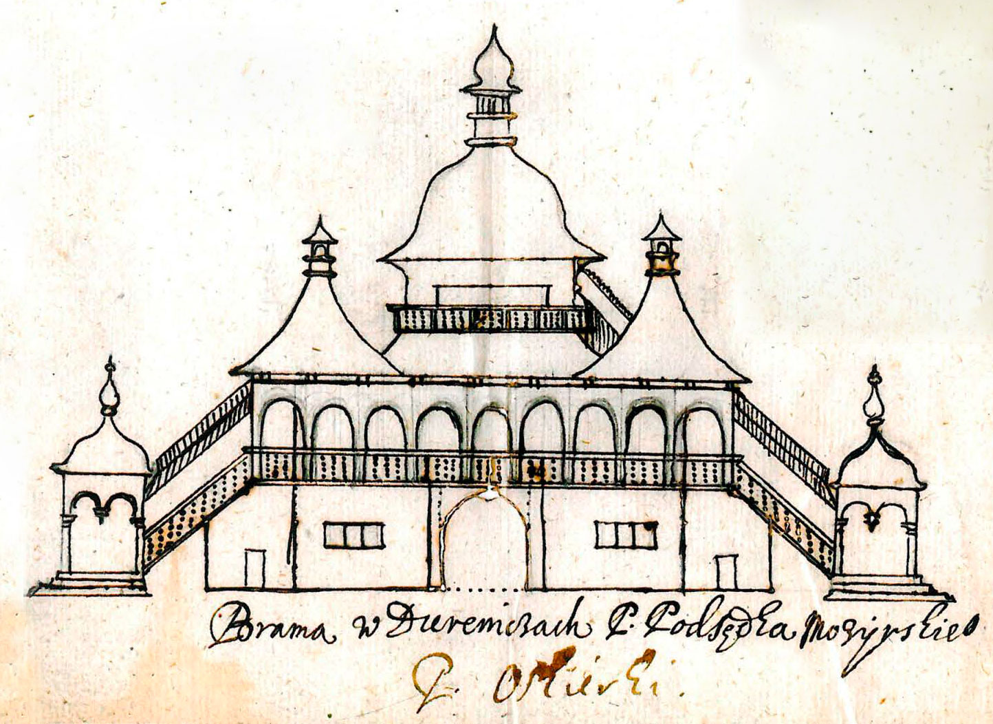 Беларуская (тарашкевіца): Дурынічы (Duryničy), сядзіба Аскеркаў (Askierka). Брама